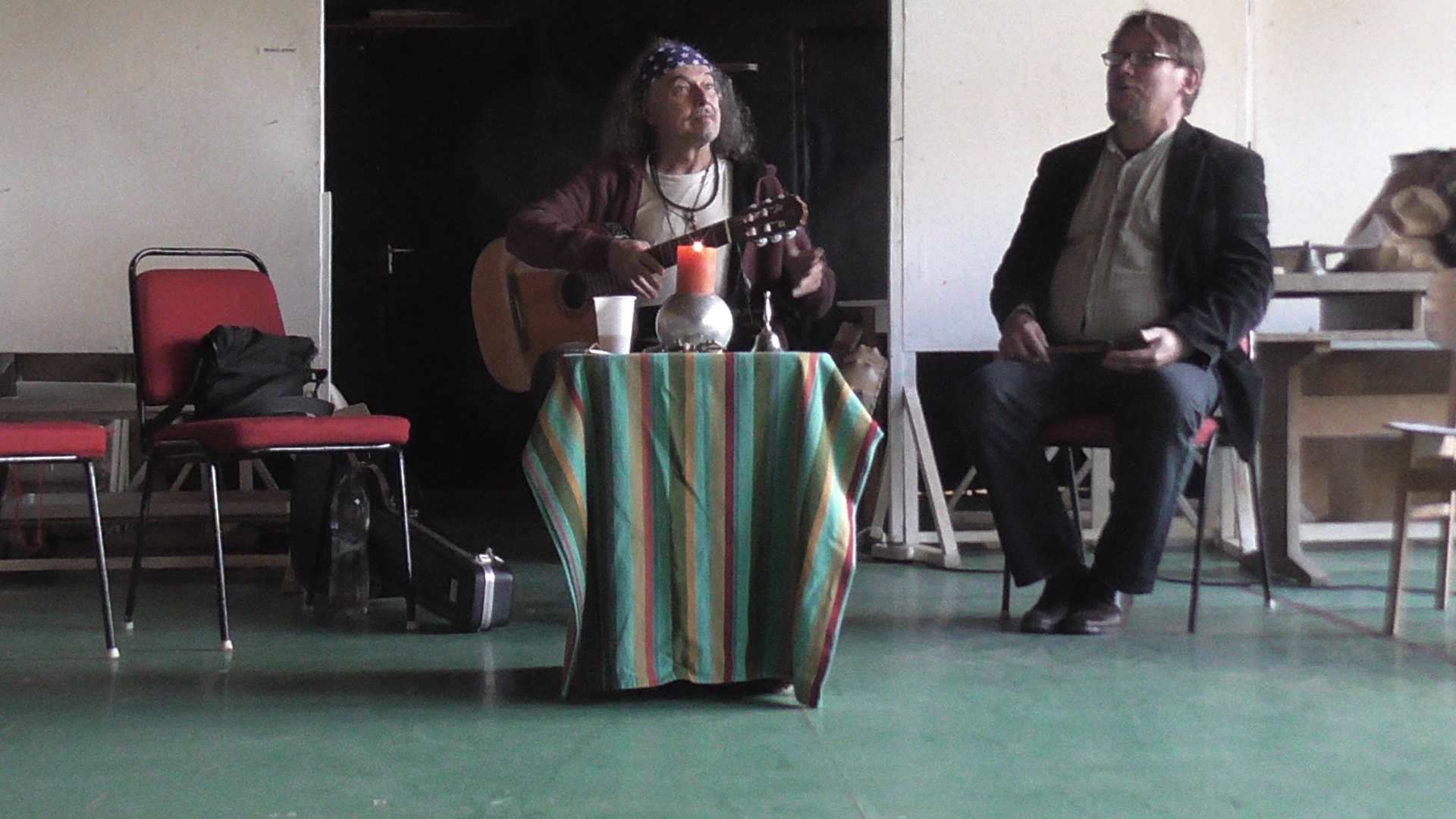 Laár András és Paulinyi Tamás a Pszichedelikus utak a spiritualitásban / Transz és Tudat elnevezésű elvonuláson a zebegényi művésztelepen